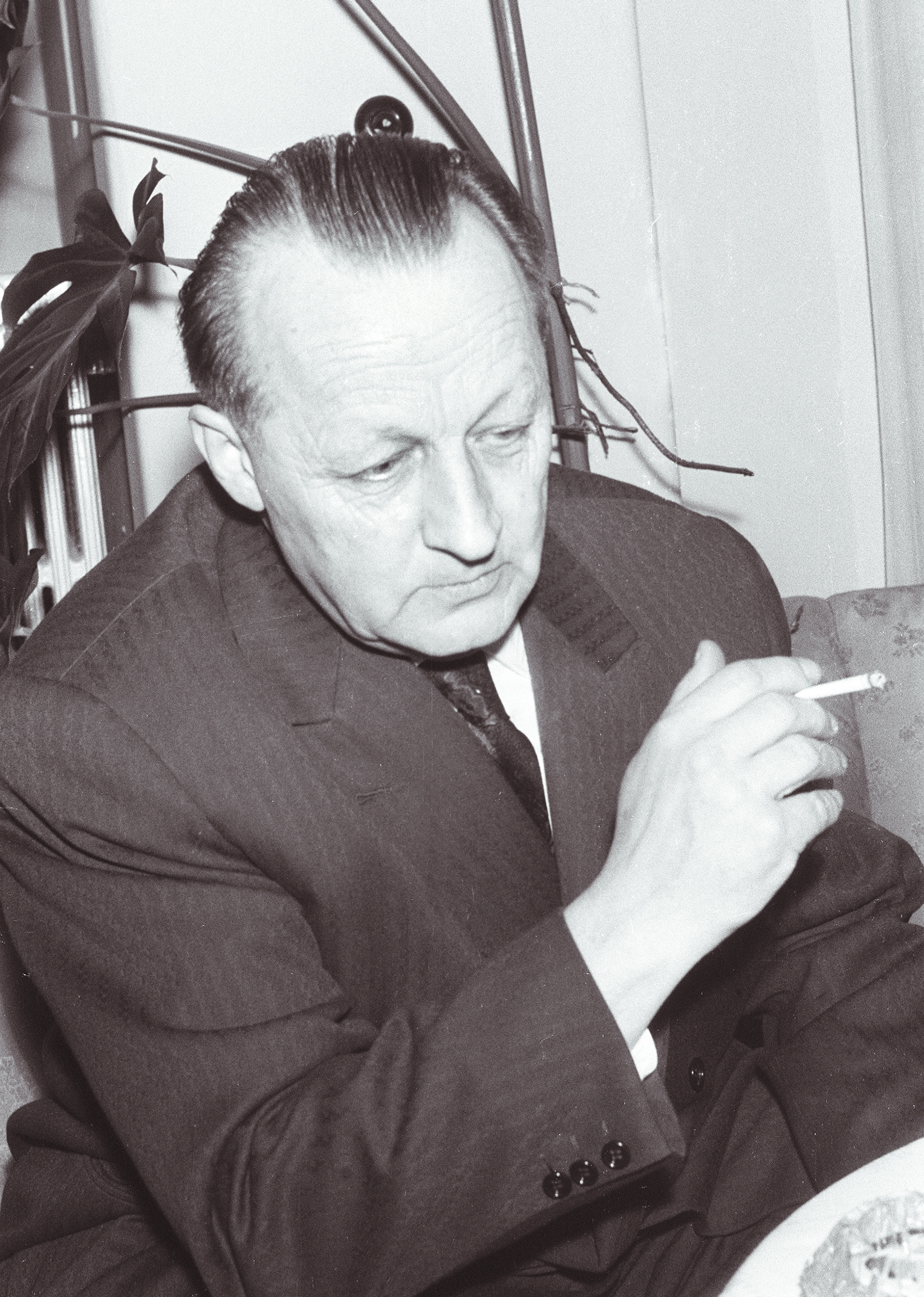 Mile Klopčič